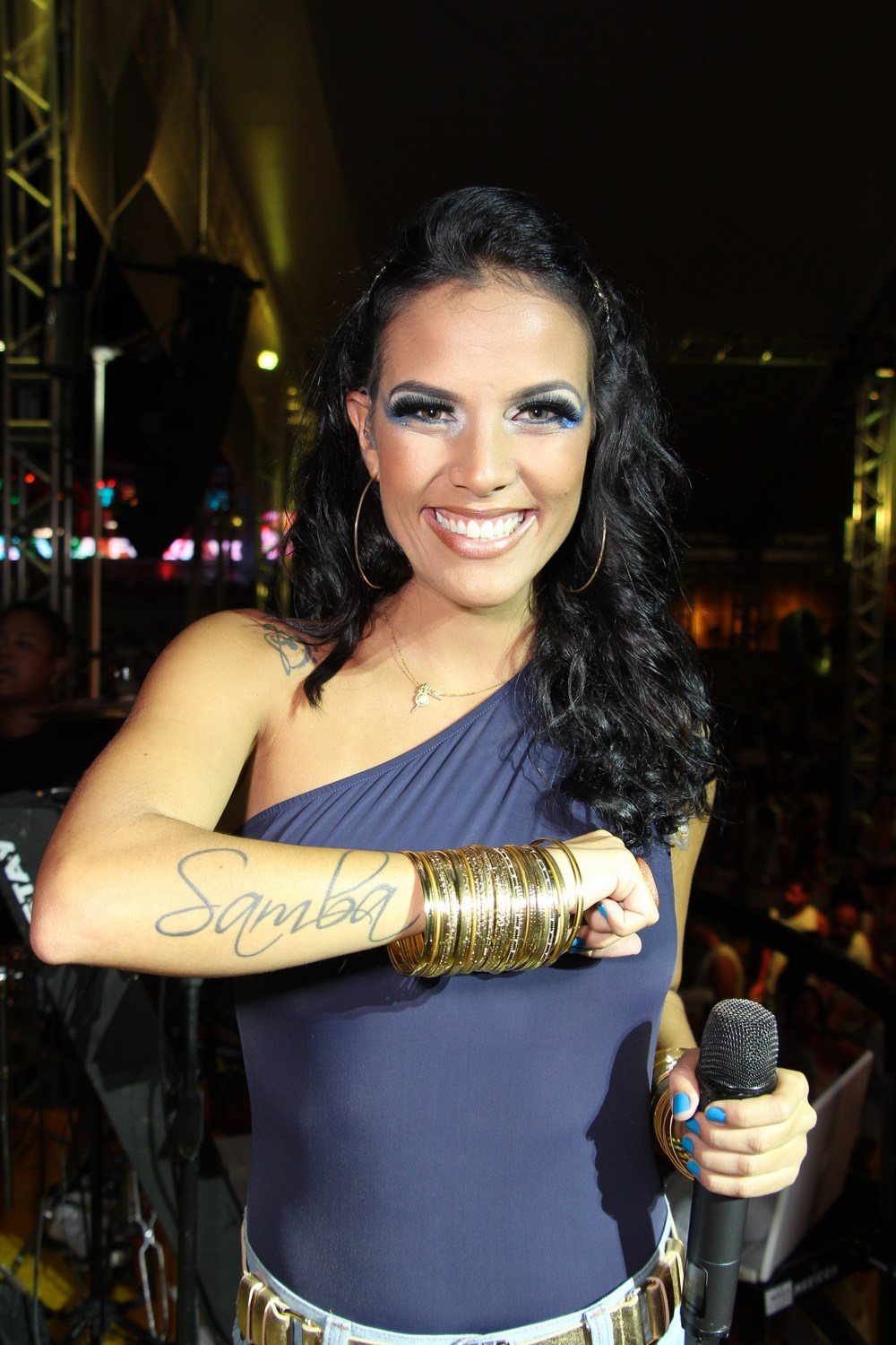 A ex-participante do The Voice Brasil Ju Moraes.